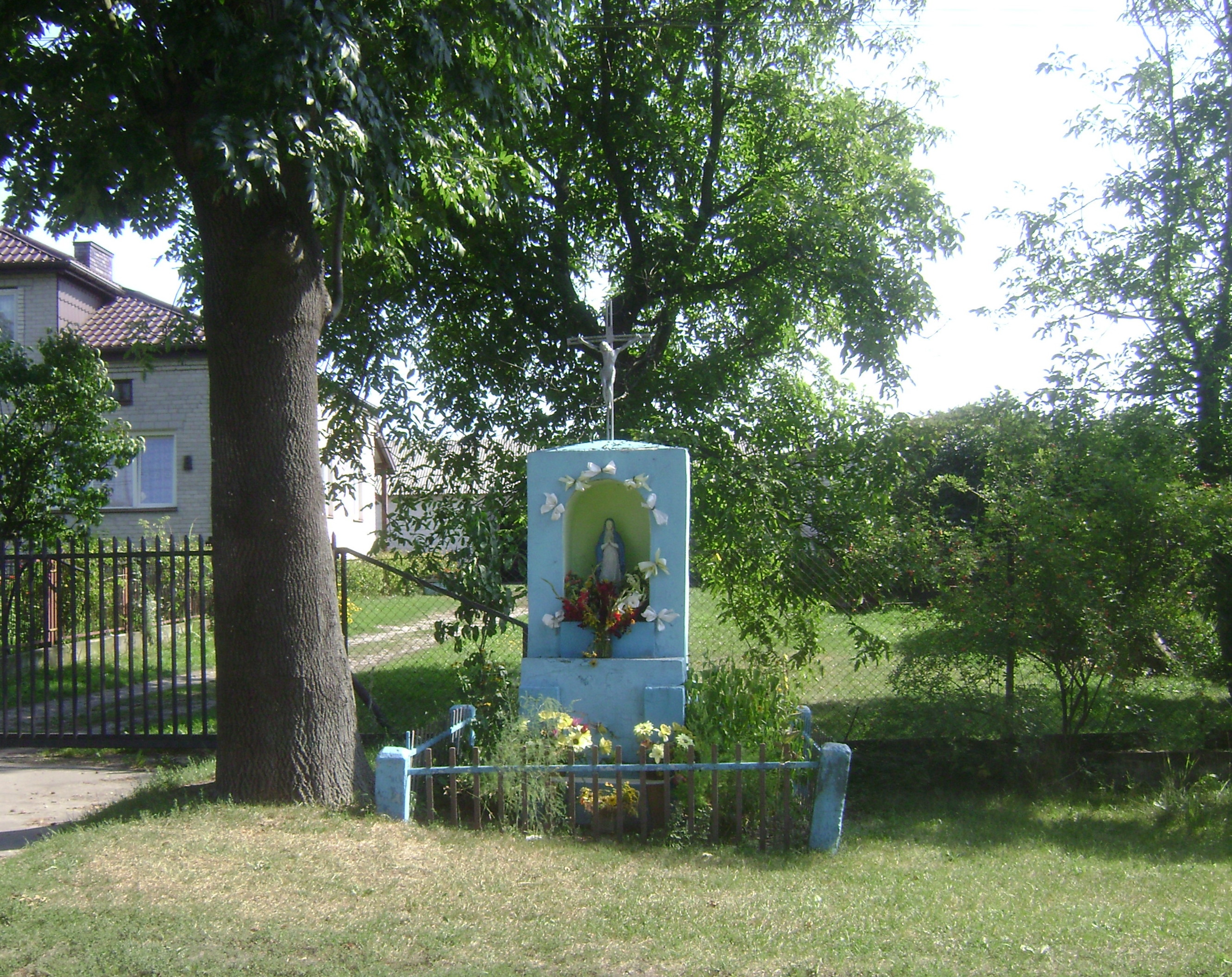 Wieś Brzumin, przydrożna kapliczka